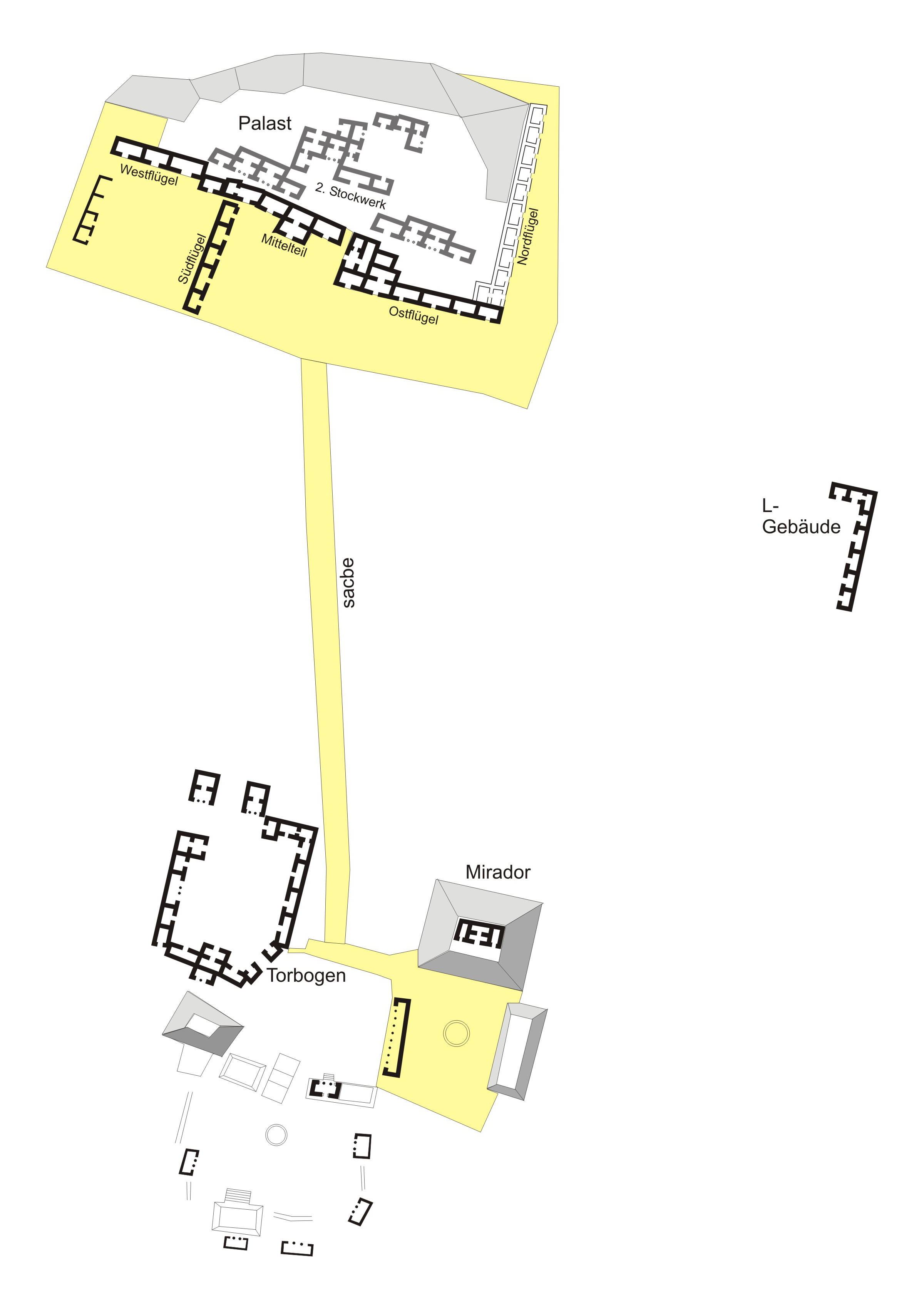 Labná, Yucatan, Mexiko: Plan des zentralen Ruinenkomplexes.